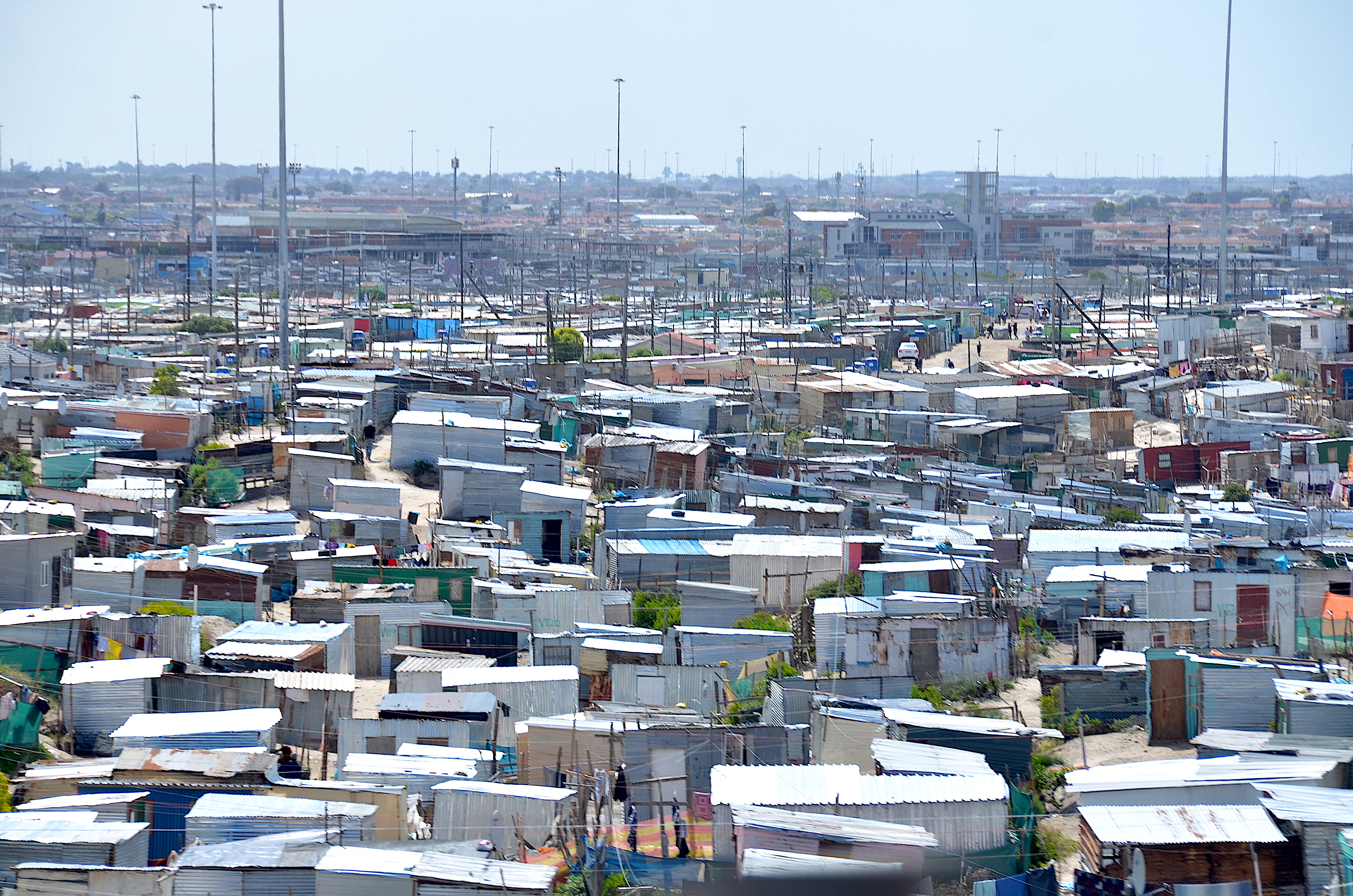 Khayelitsha am Baden Powell Drive (R310)